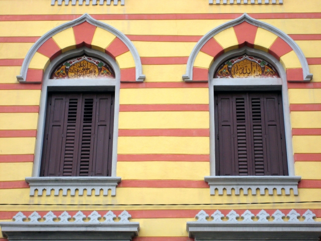 "Turska kuća" ("Casa turca") u Rijeci